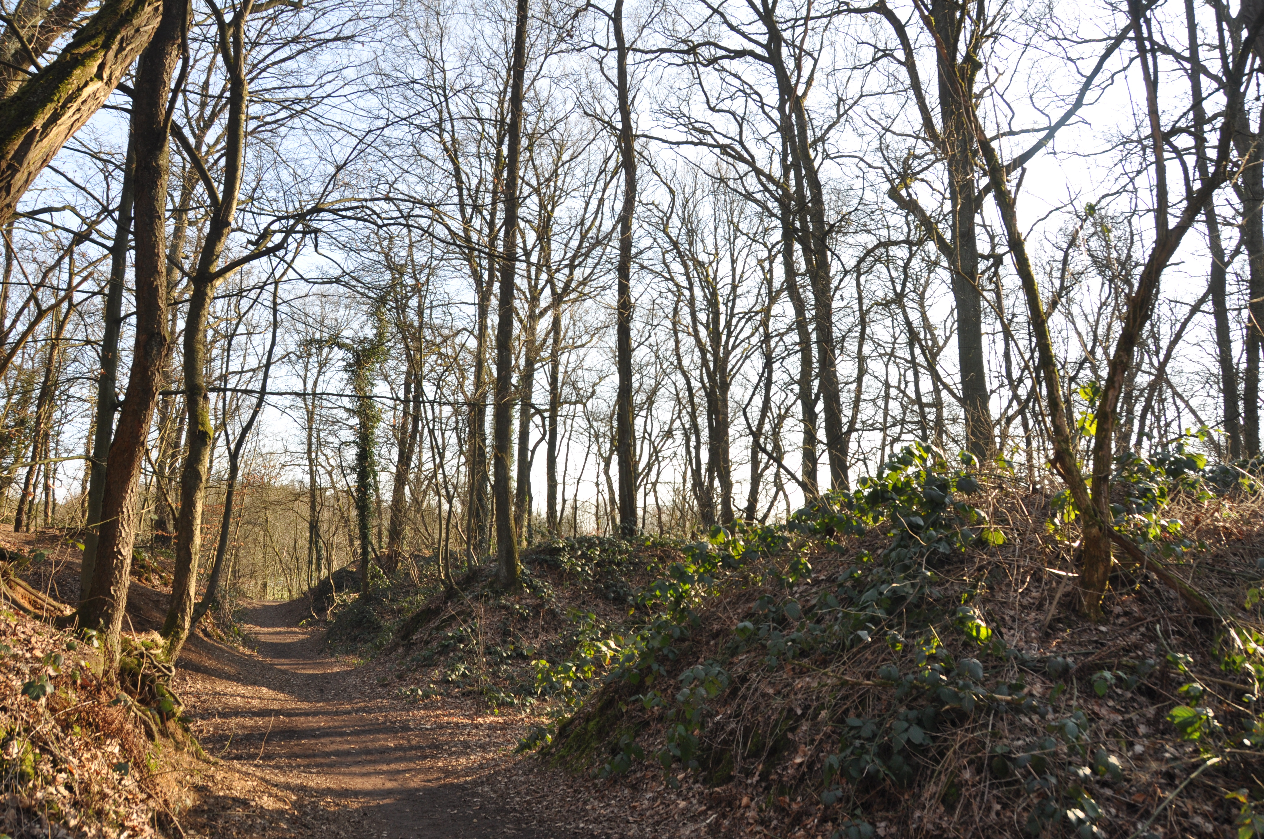 Querender Spazierweg mit Blick auf mehrere Erdwälle